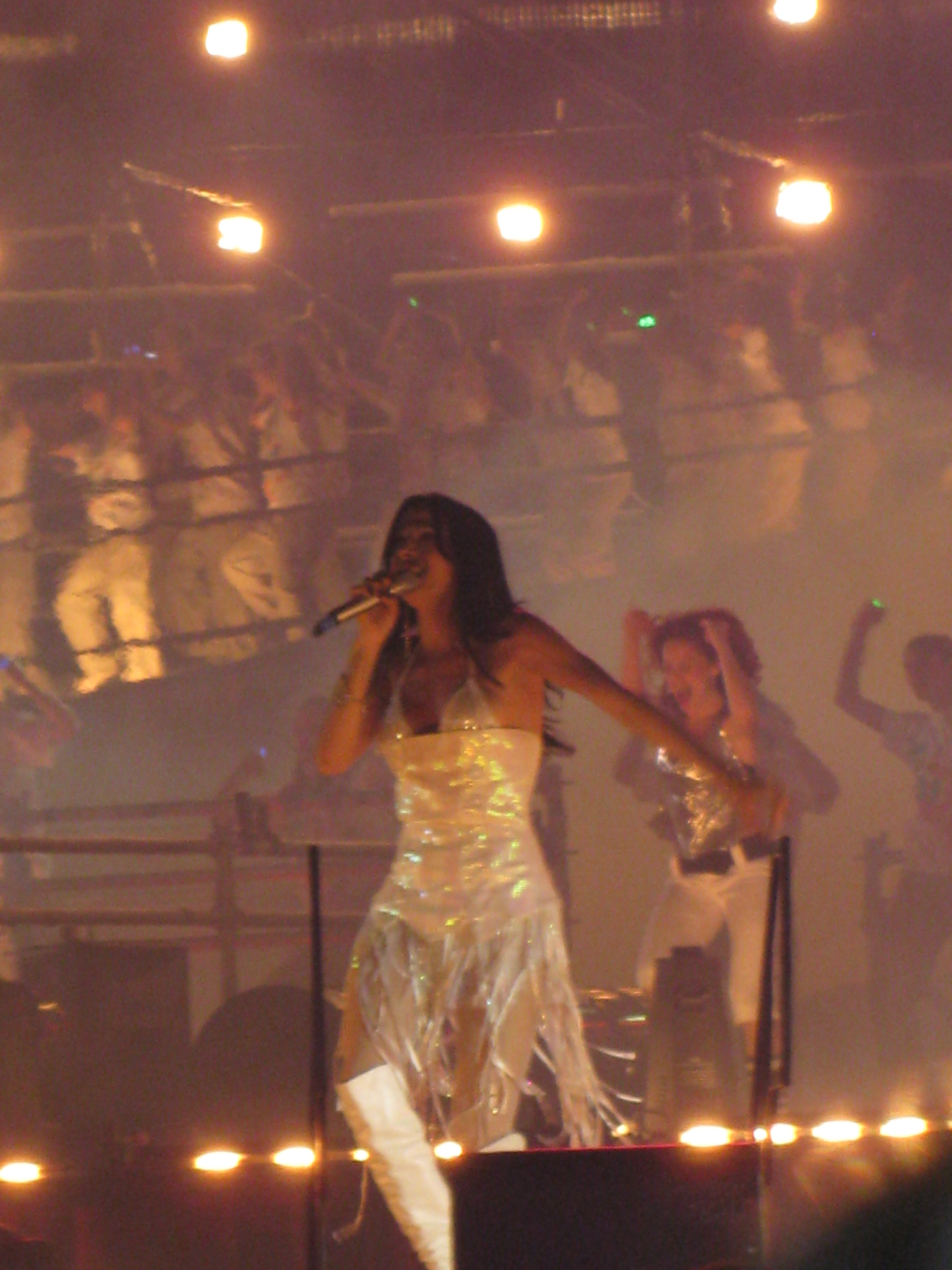 Tel Aviv 100th anniversary opening celebration in Rabin Square דנה אינטרנשיונל- אירוע הפתיחה לחגיגות המאה לתל אביב